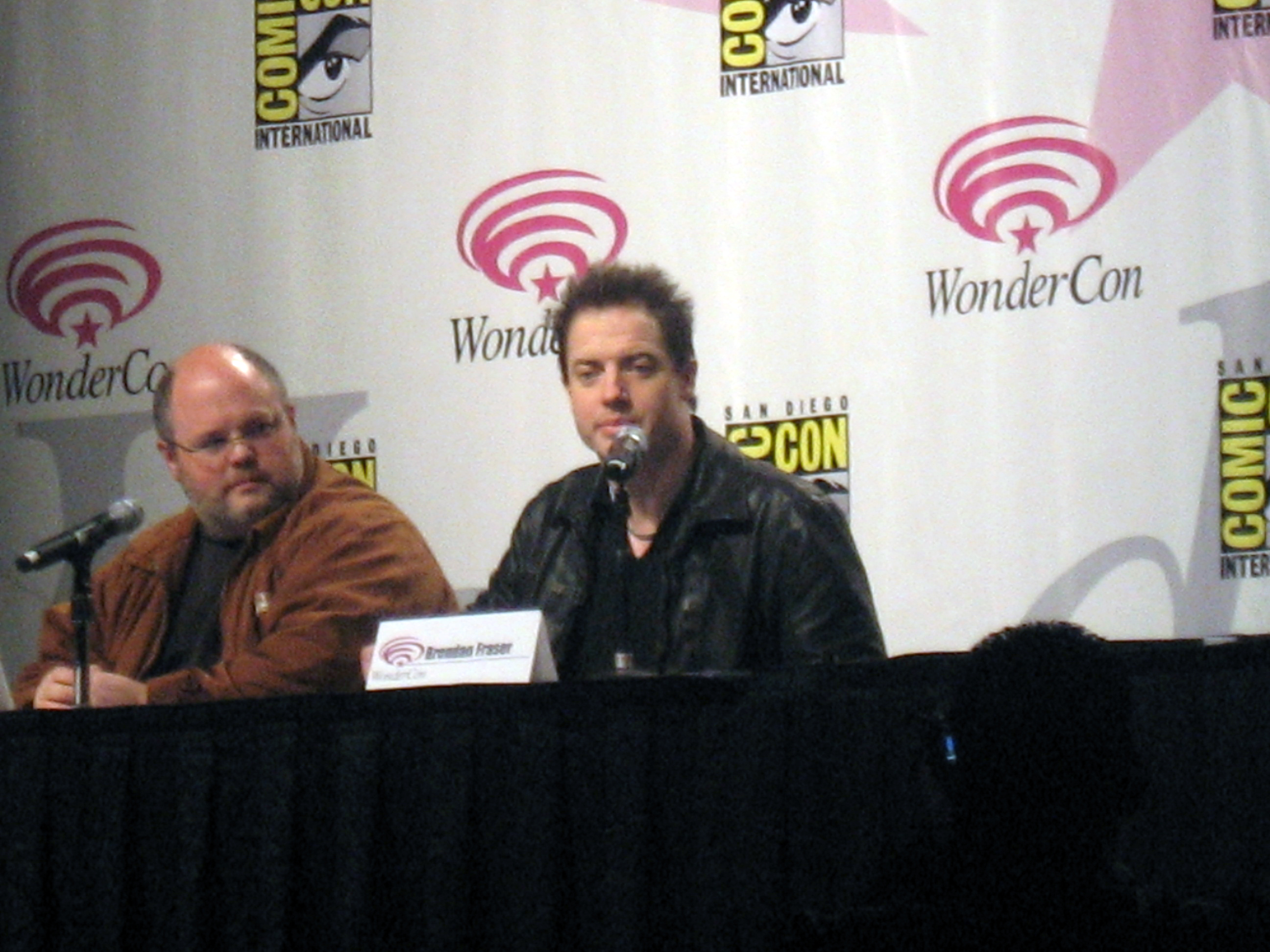 Brendan Fraser lors d'une promotion du film Voyage au centre de la Terre